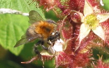 zelfgemaakte foto van bloemen van Japanse wijnbes; derde week juni